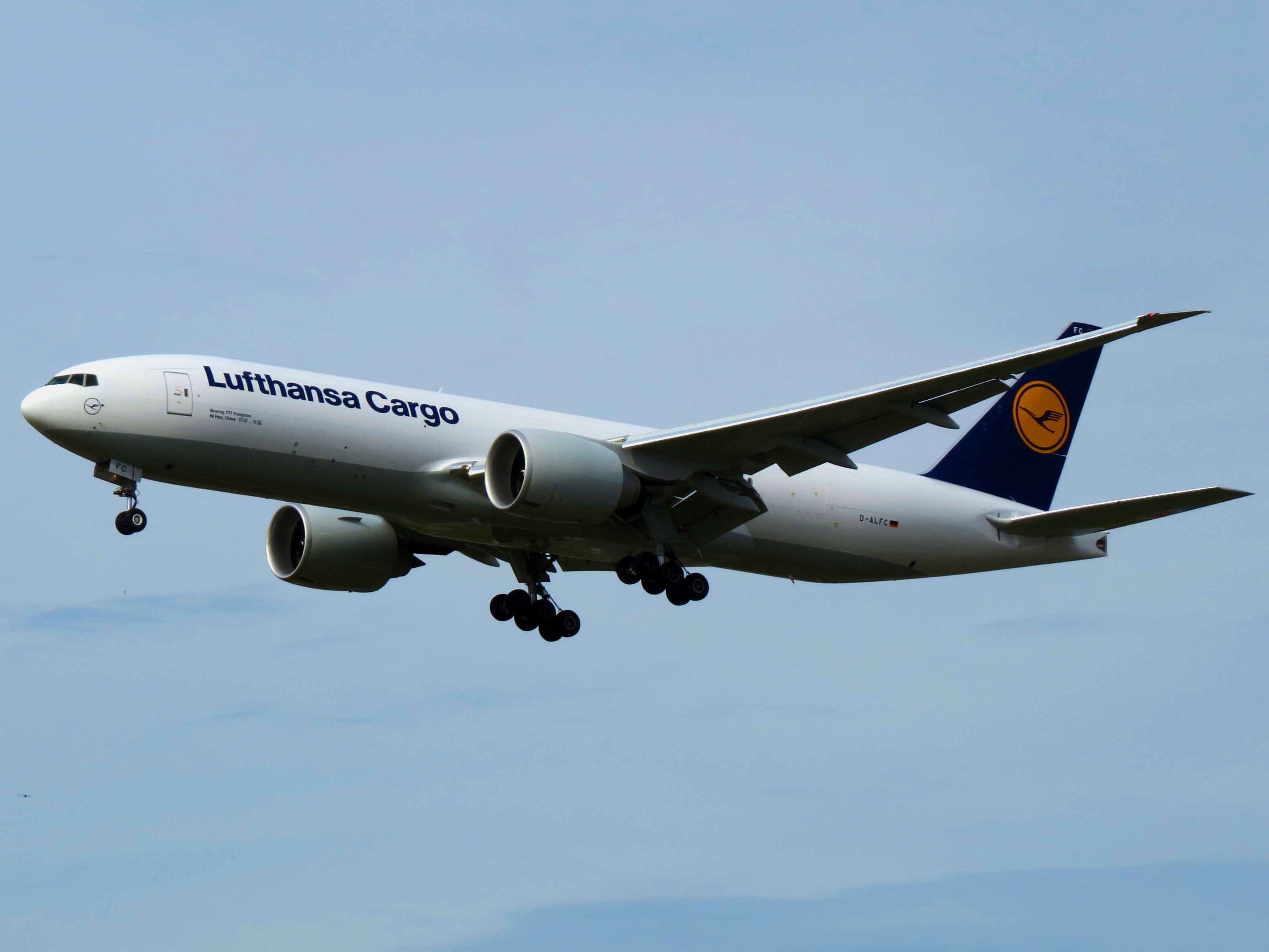 Lufthansa Cargo, Boeing 777-F, D-ALFC "Ni Hao, China 你好，中国" 07.04.2014 FRA